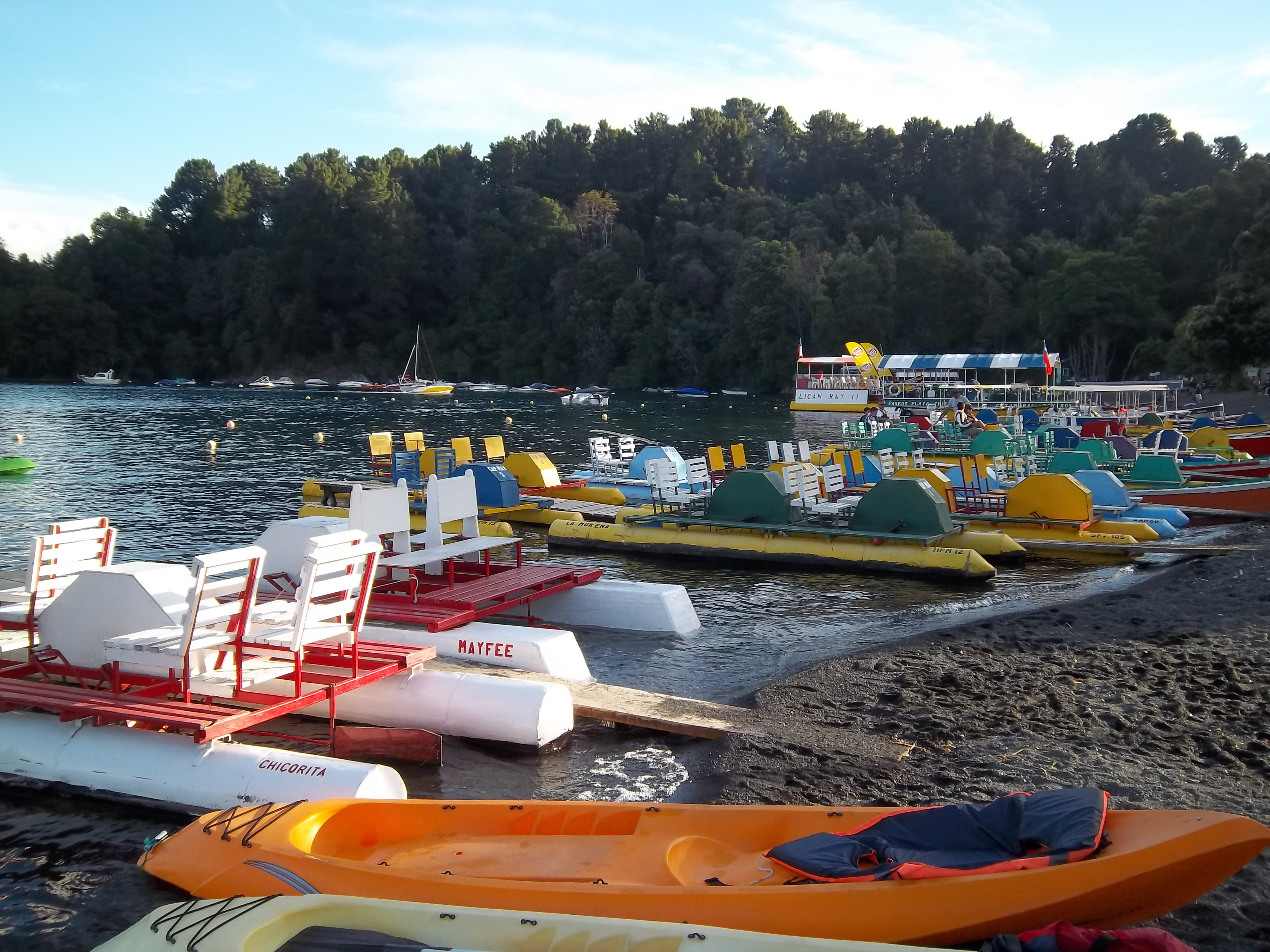 Embarcadero en la Playa Chica de Lican Ray, en la Región de la Araucanía, Chile.